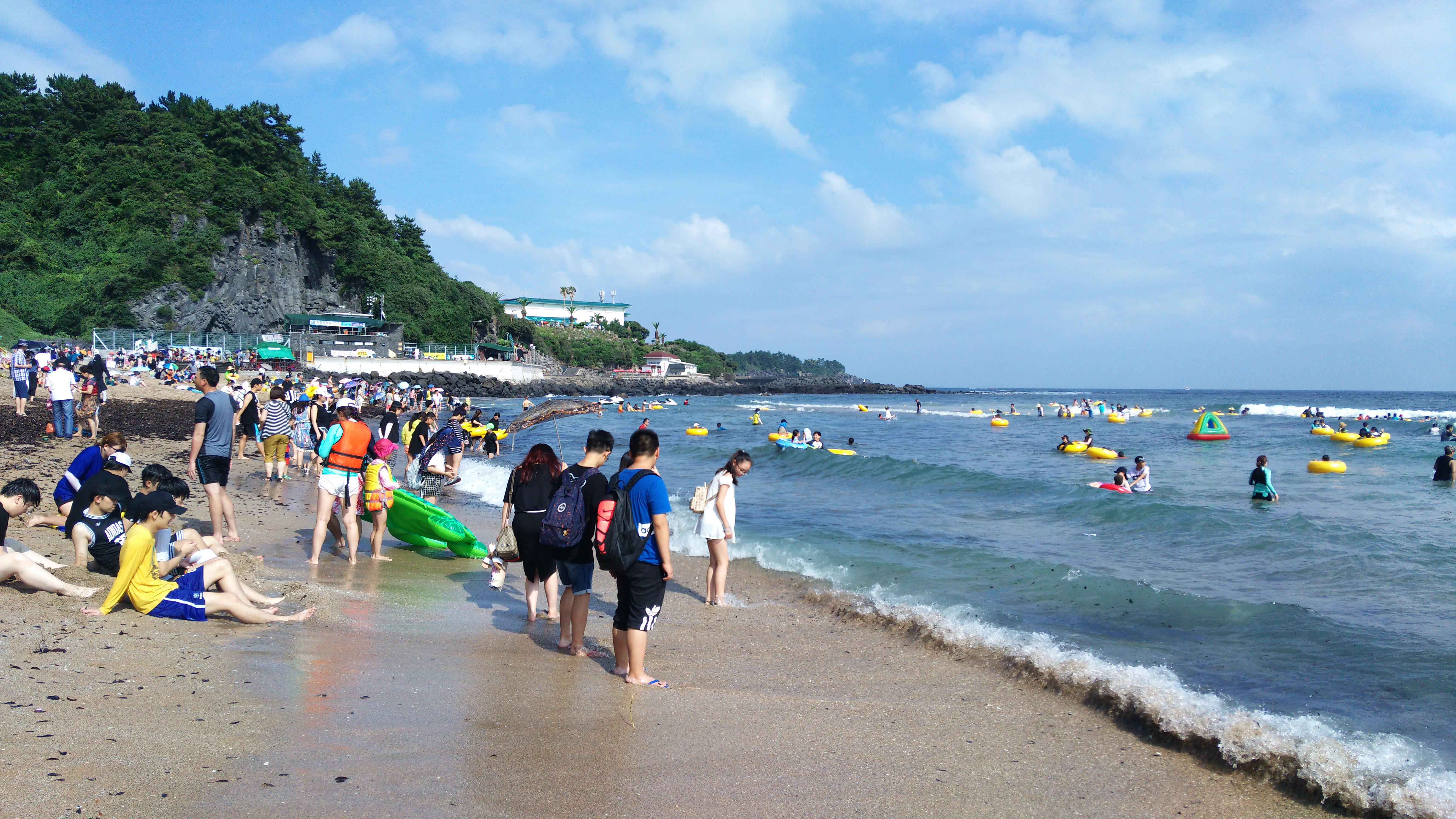 Saekdal-dong, Seogwipo-si, Jeju-do, South Korea